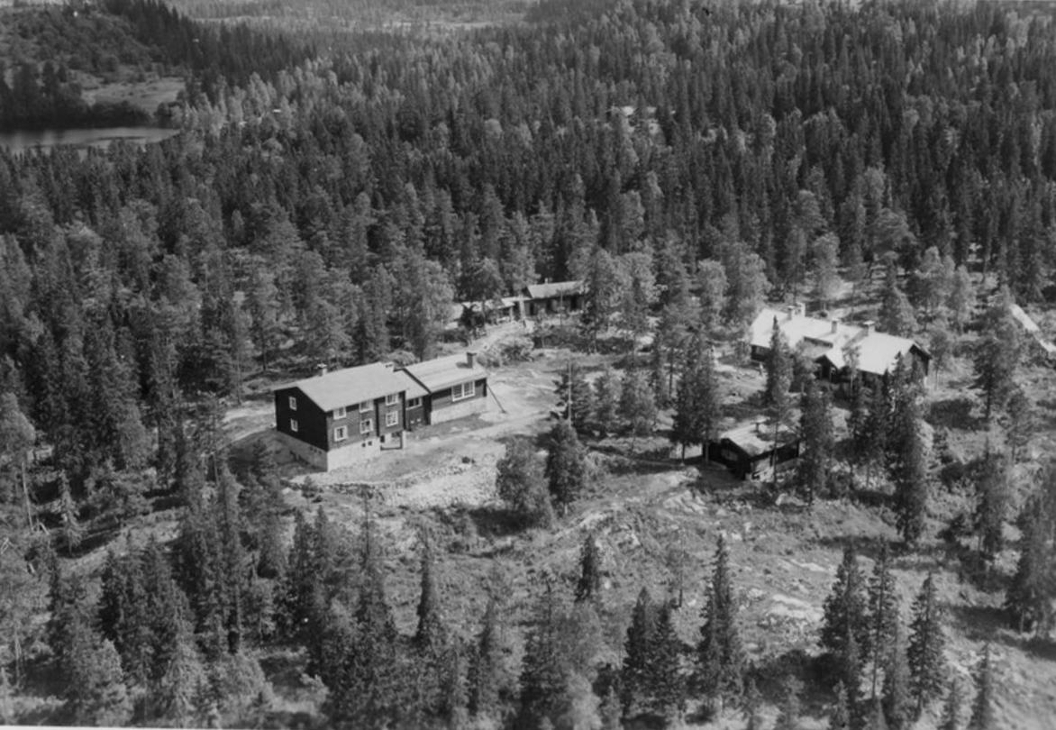 Studenterhytta i Nordmarka, 1954